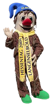 Fotografie des Hessentags-Maskottchens 2009